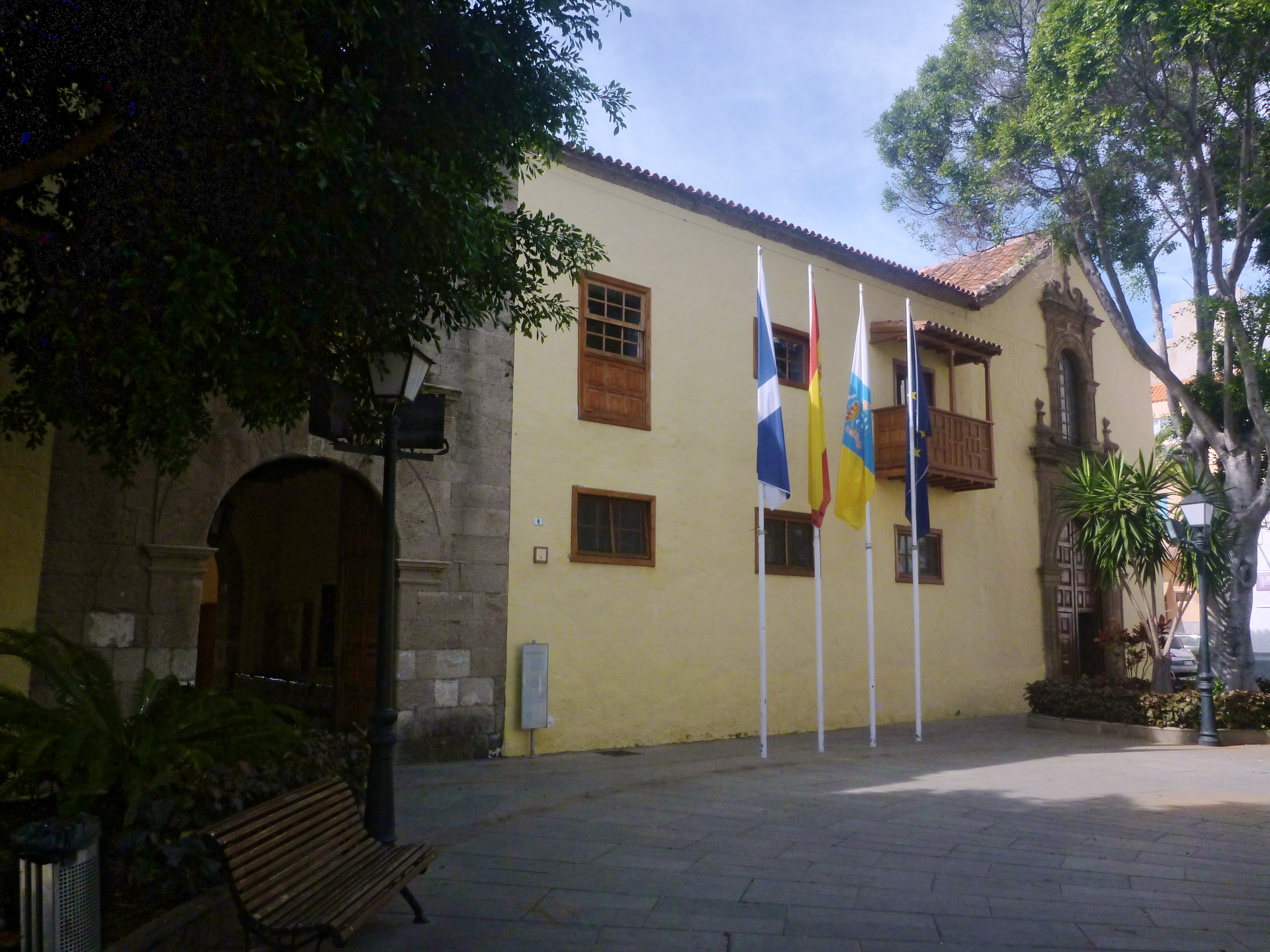 Ayuntamiento de Güímar e Iglesia situados en el antiguo Convento de Santo Domingo, siglo XVII, Güímar, Tenerife.